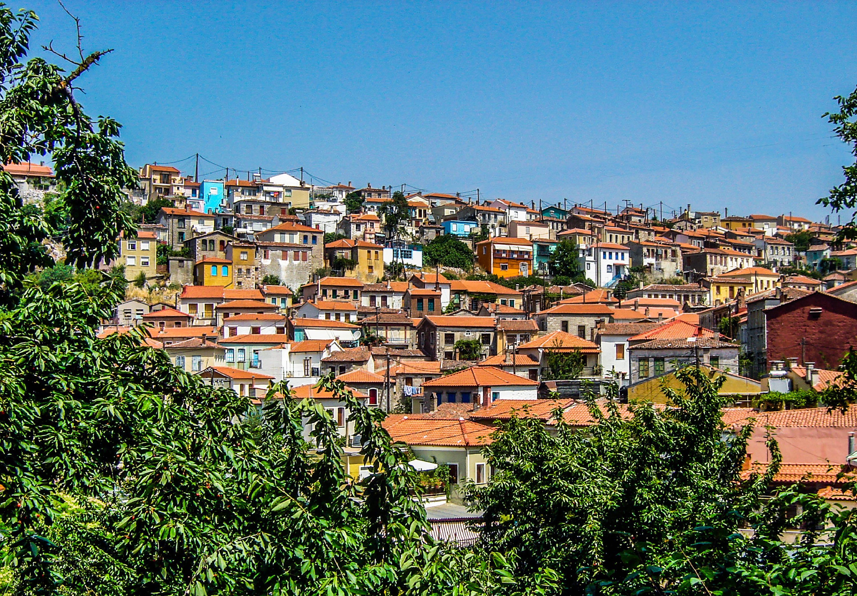 Η ομορφιά του τοπίου, η χλωρίδα και η πανίδα. This is a photography of Natura 2000 protected area with ID Όλυμπος. Λέσβος. Όρος Όλυμπος. Λέσβος.